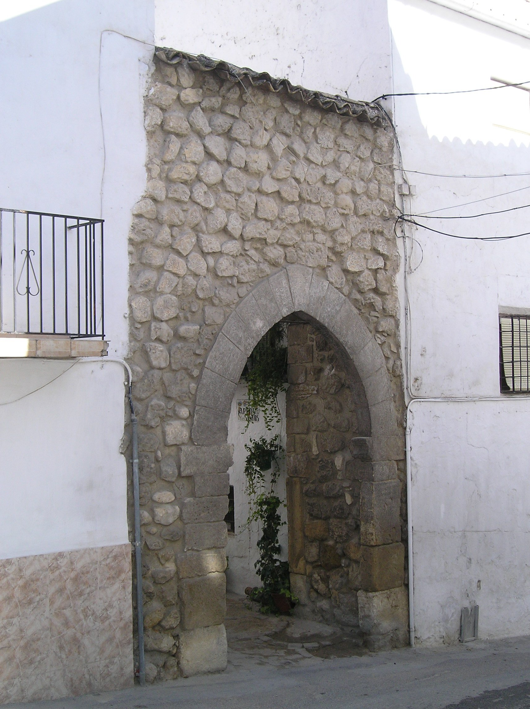 Arco nuevo en Quesada